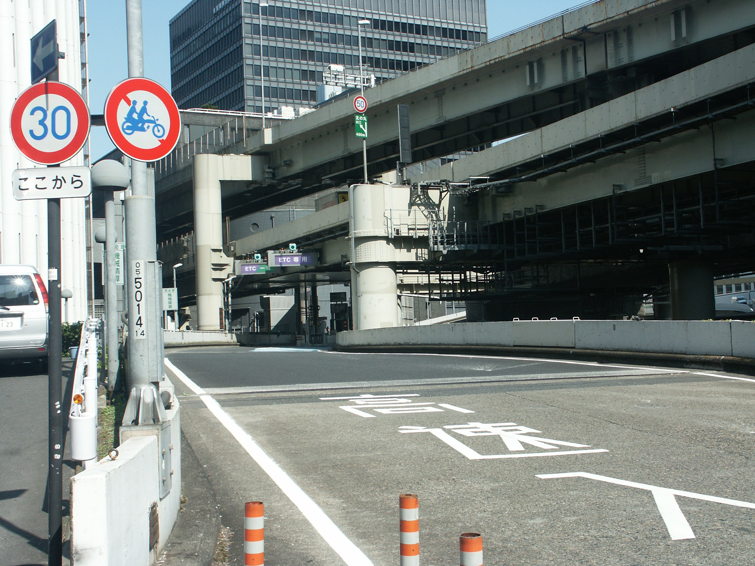 首都高速5号池袋線一ツ橋入口（料金所付近）